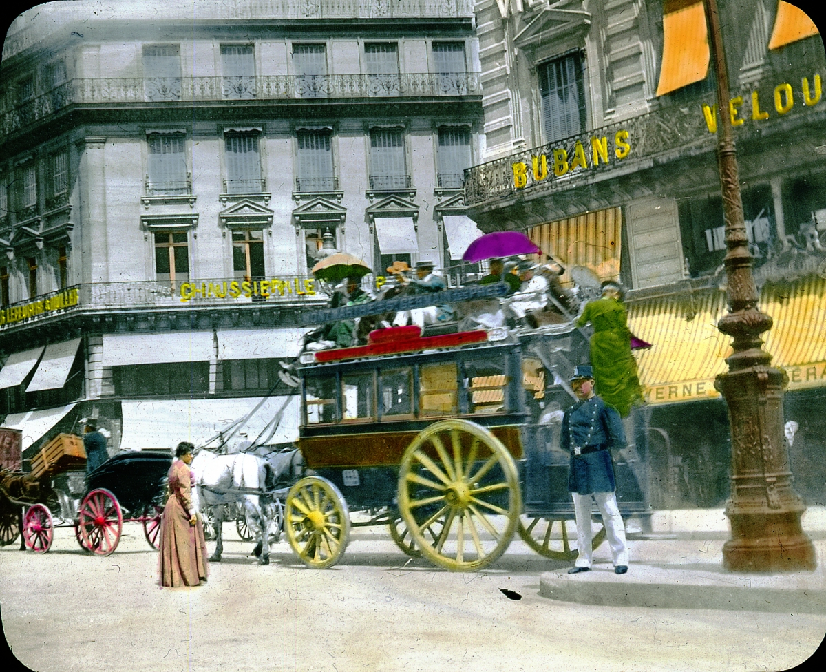 Omnibus à Paris en 1900 (ligne Montmarte/Saint-Germain-des-Prés).Note : Immeubles d'angle 26 et 28, avenue de l'Opéra / rue des Petits-Champs. Sur la droite, derrière l'omnibus, la Taverne de l'Opéra (Société des Tavernes Pousset et Royale réunies), inaugurée le 27 juin 1898 [1] au n° 26. Les Galeries Goldscheider au n° 28 en 1892.